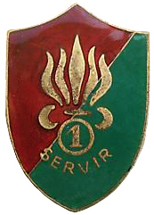 Insigne régimentaire du 21e régiment de marche de volontaires étrangers